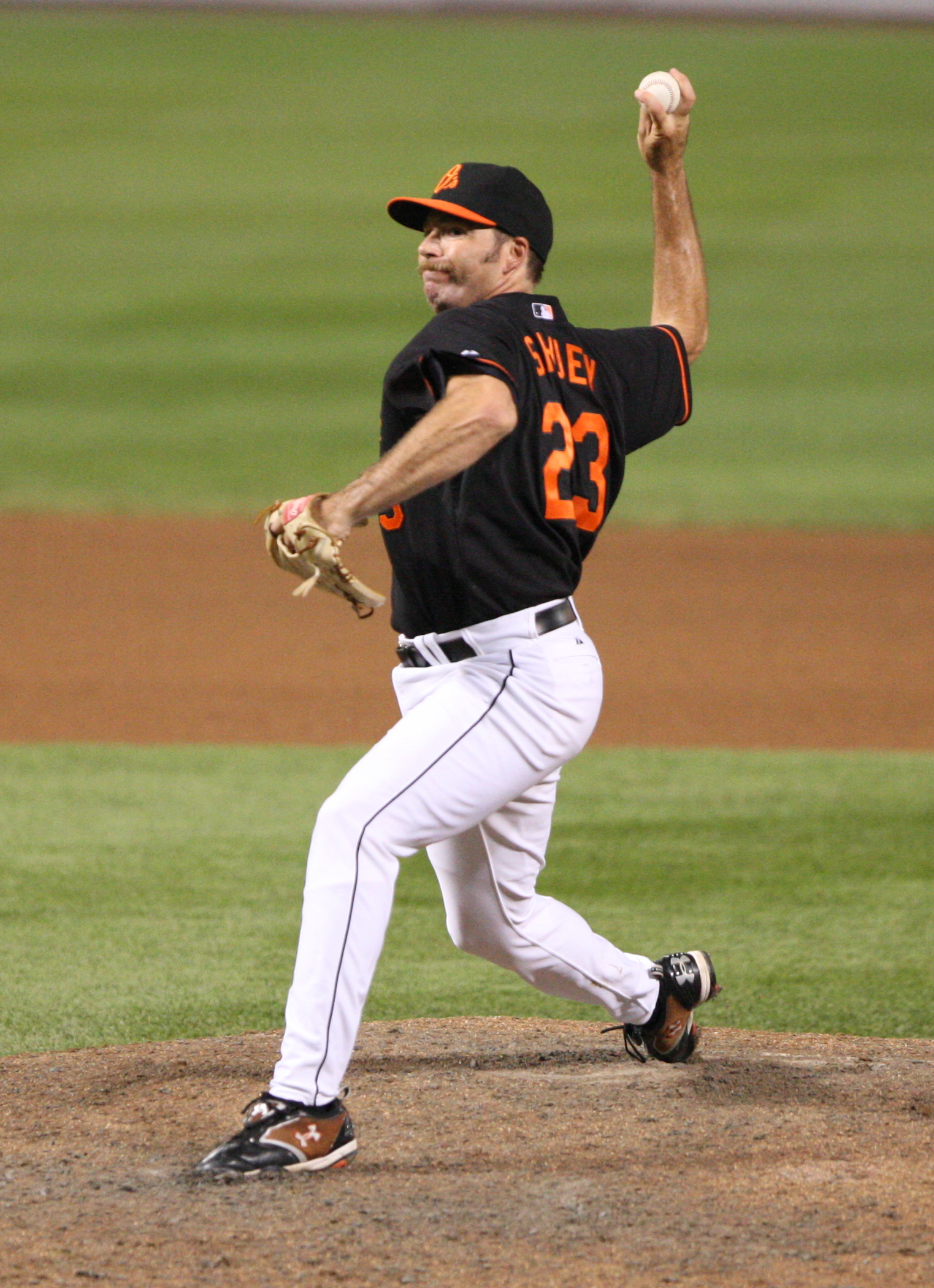 Paul Shuey